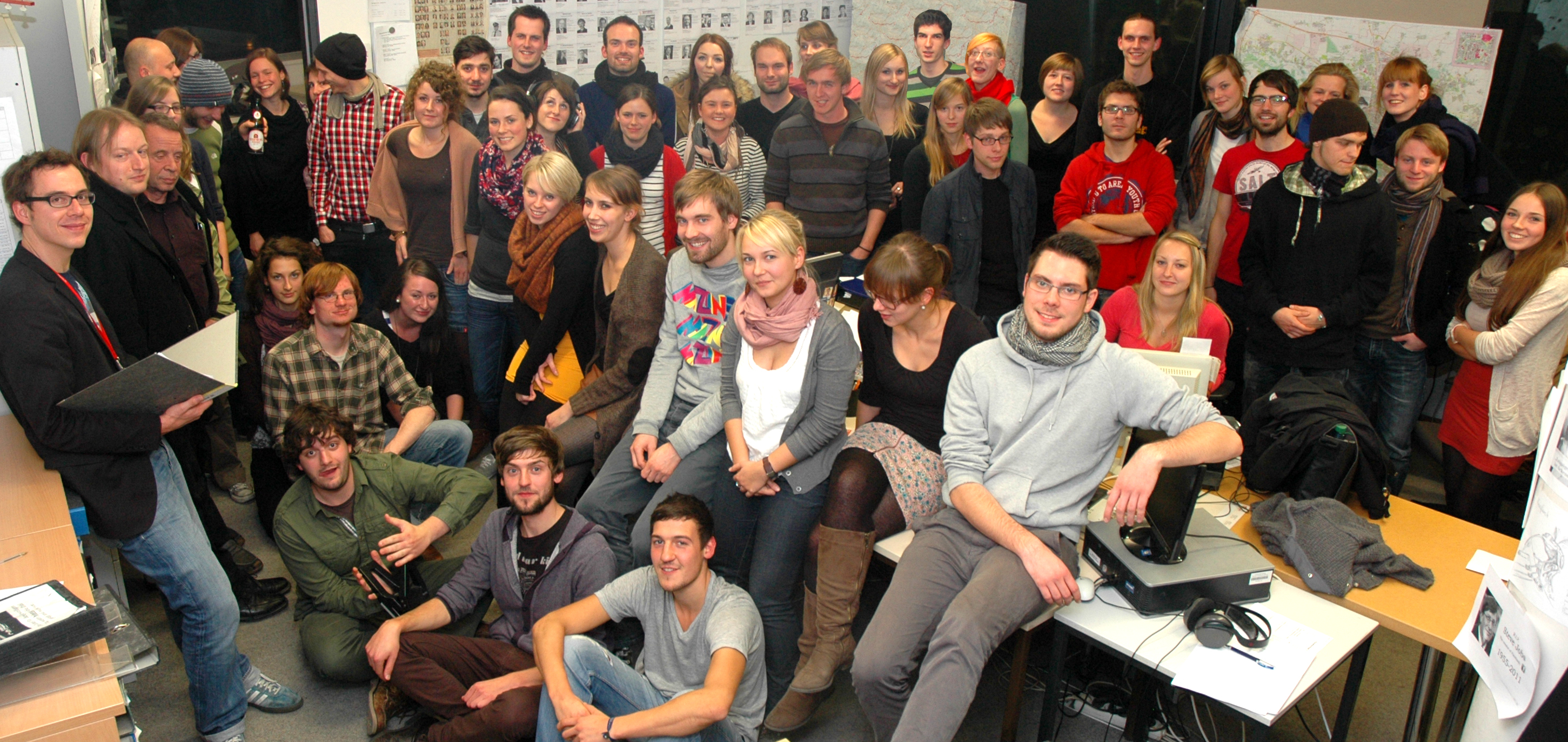 die komplette Redaktion von mephisto 97.6